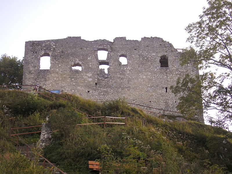 Burg Falkenstein bei Pfronten (Allgäu). Die Burg von Norden. Eigene Aufnahme, Sept. 2006 / Falkenstein castle near Pfronten (Bavaria, Germany). View from the north. Own photo, Sept. 2006